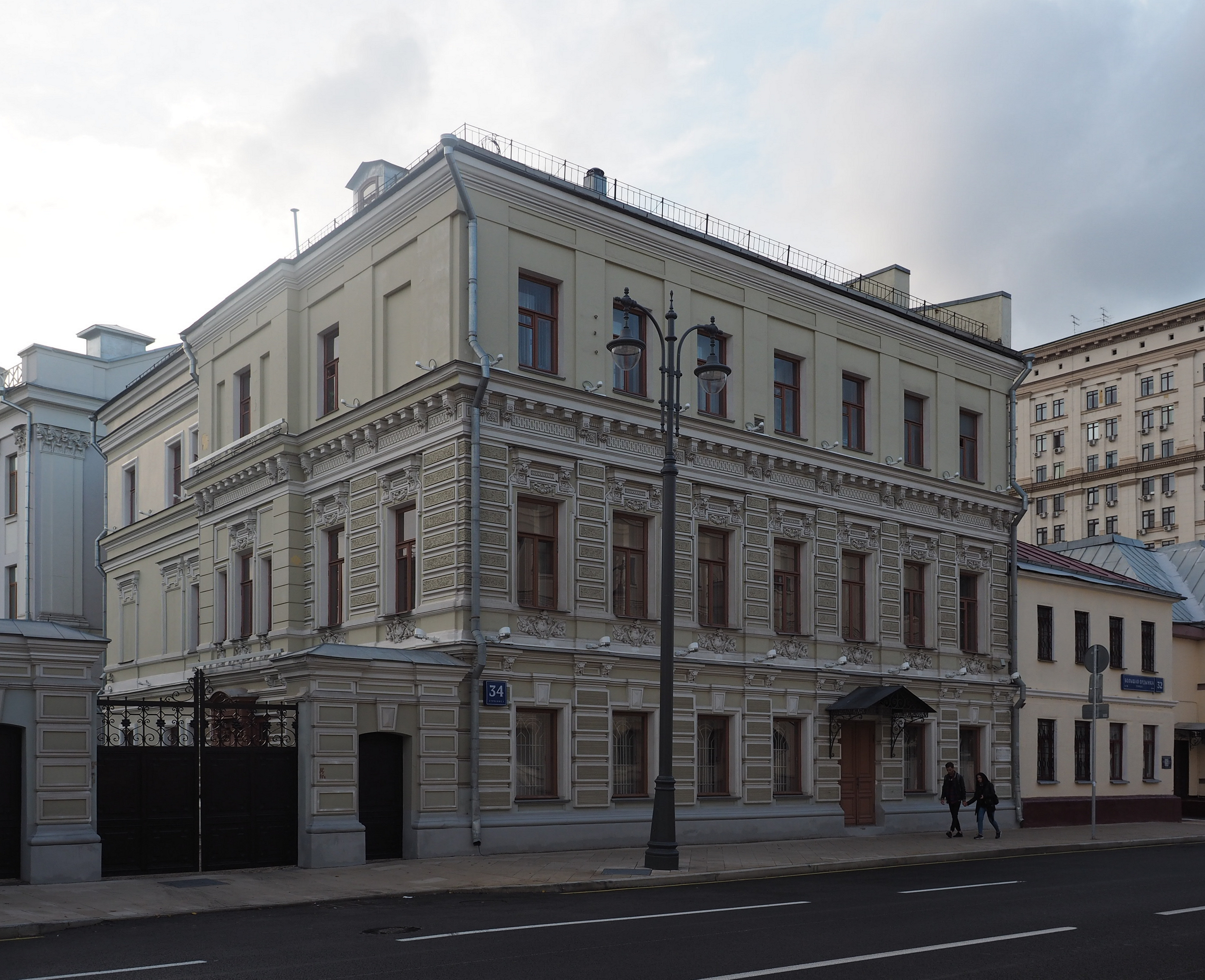 Аптека и амбулатория: Ордынка Б. ул., дом 34, строение 1, Якиманка, Центральный округ, Москва